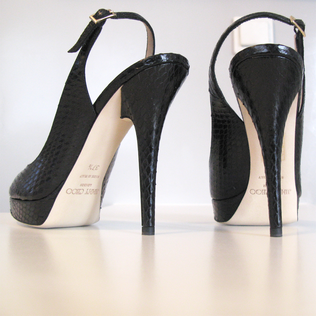 escarpins ouverts en Élaphe de marque Jimmy Choo, modèle Clue, talons 115mm, plateforme de 20mm.